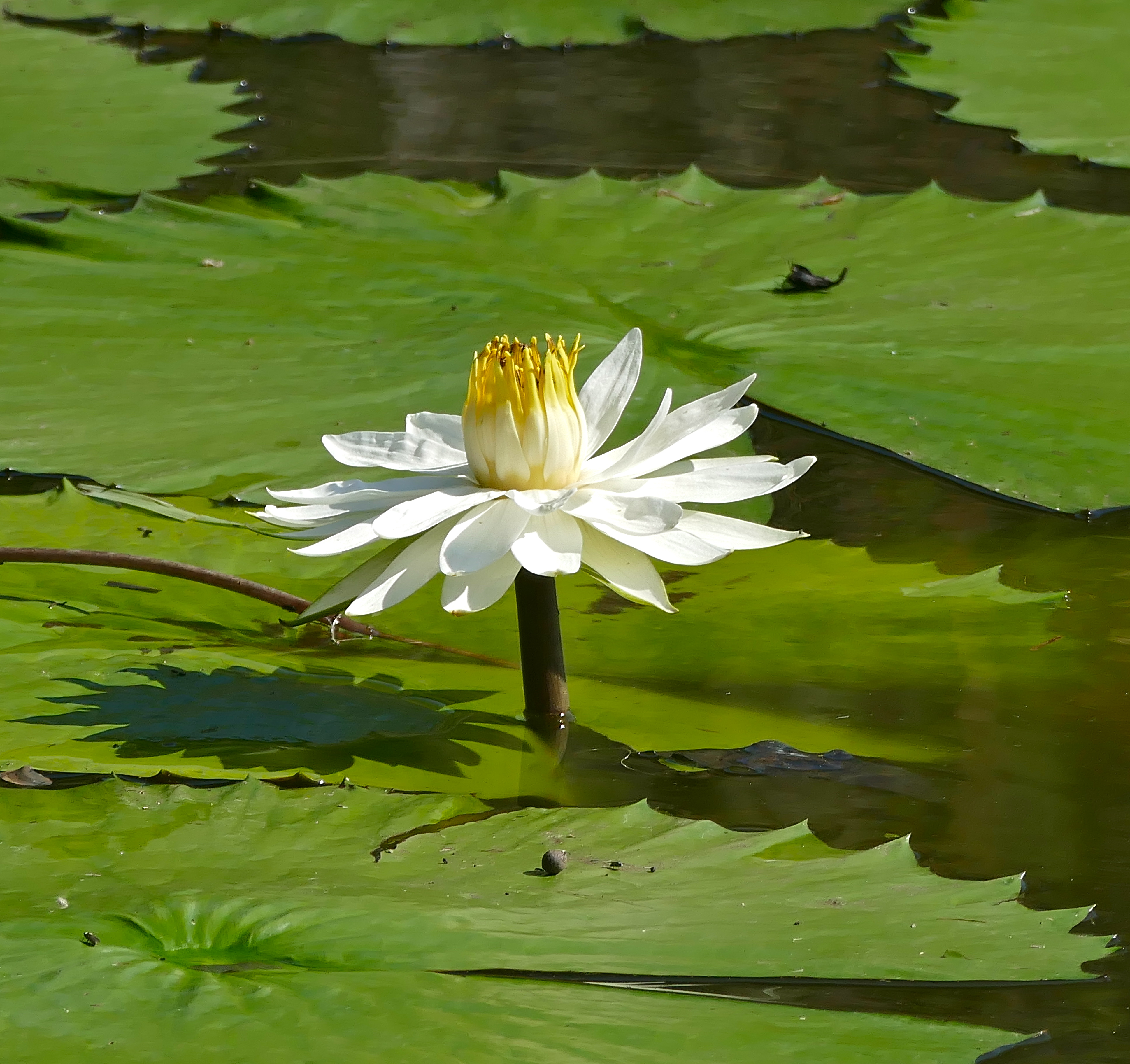 Lake Panic Hide West of Skukuza, Kruger NP, Mpumalanga, SOUTH AFRICA